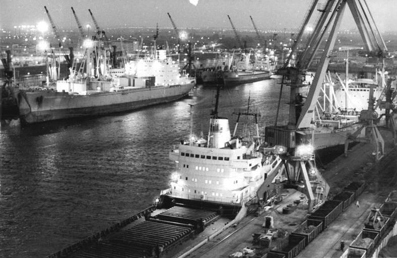 Rostock, Überseehafen, Verladearbeiten, Nacht ADN-ZB Sindermann 21.6.1983 Für Bezieher des ADN-Reportagedienstes! Zum Beitrag: Was Seeleute im Seehafen Rostock sehen - Eine Hafenrundfahrt mit dem Ausflugsschiff "Undine" Der Rostocker Überseehafen hat in reichlich zwei Jahrzehnten über die mehr als 170 Schiffe zählende Handelsflotte der Dustfracht- Seereederei Rostock und viele ausländische Frachter Verbindungen zu 400 Häfen auf allen Kontinenten gehabt. Seit hier 1960 das erste Schiff abgefertigt wurde, haben immerhin 53 700 Frachter aus 65 Ländern etwa 230 Millionen Tonnen Außenhandelsgüter gelöscht oder geladen. Von 15 auf 23 Millionen Tonnen soll mit dem weiteren Ausbau die Jahresumschlagskapazität erweitert werden. (Hierzu gehört auch 1983-0621-301N)